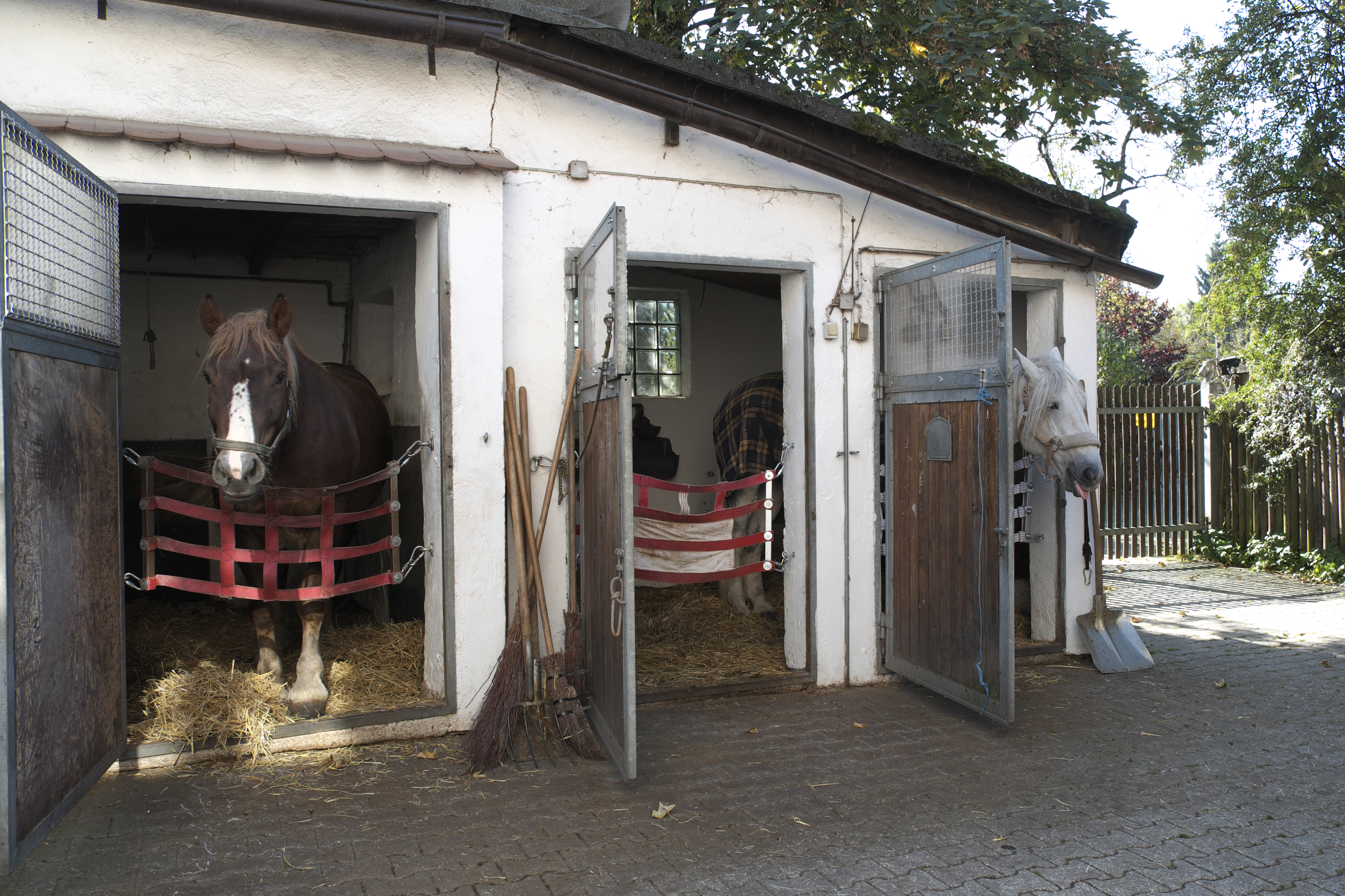 Pferdekutscherei Hans Holzmann in der Barbarasiedlung im Stadtbezirk Schwabing-West in München (Bayern/Deutschland)